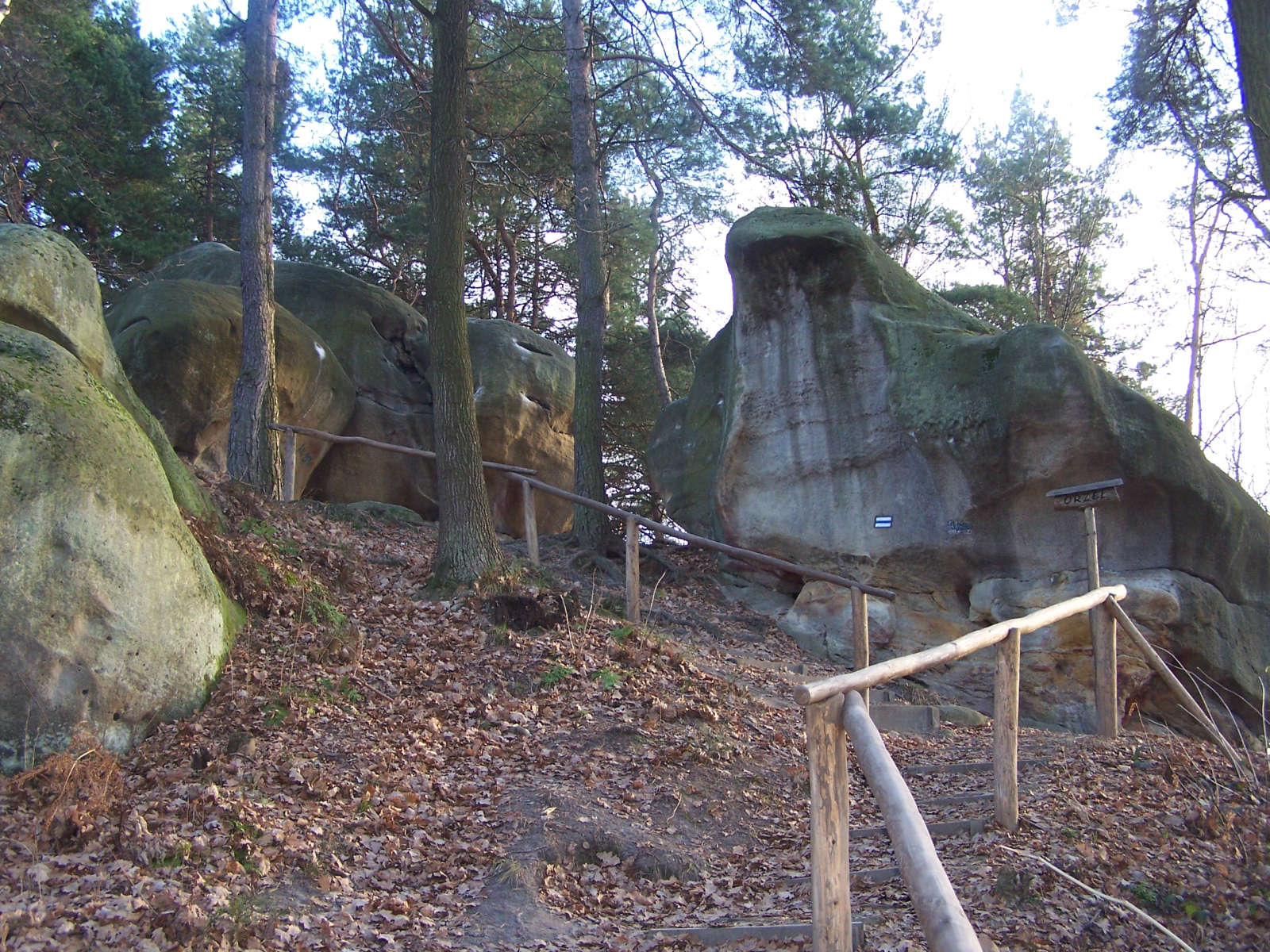 Skamieniałe Miasto (Pogórze Rożnowskie)